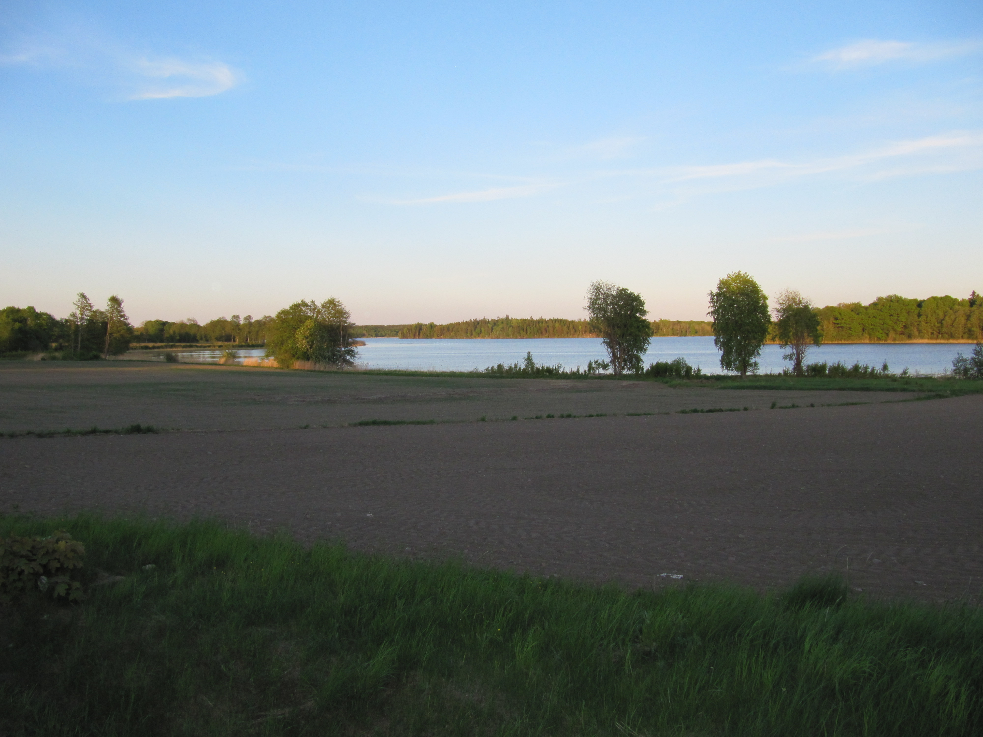 Valloxen fotograferad från riksväg 77